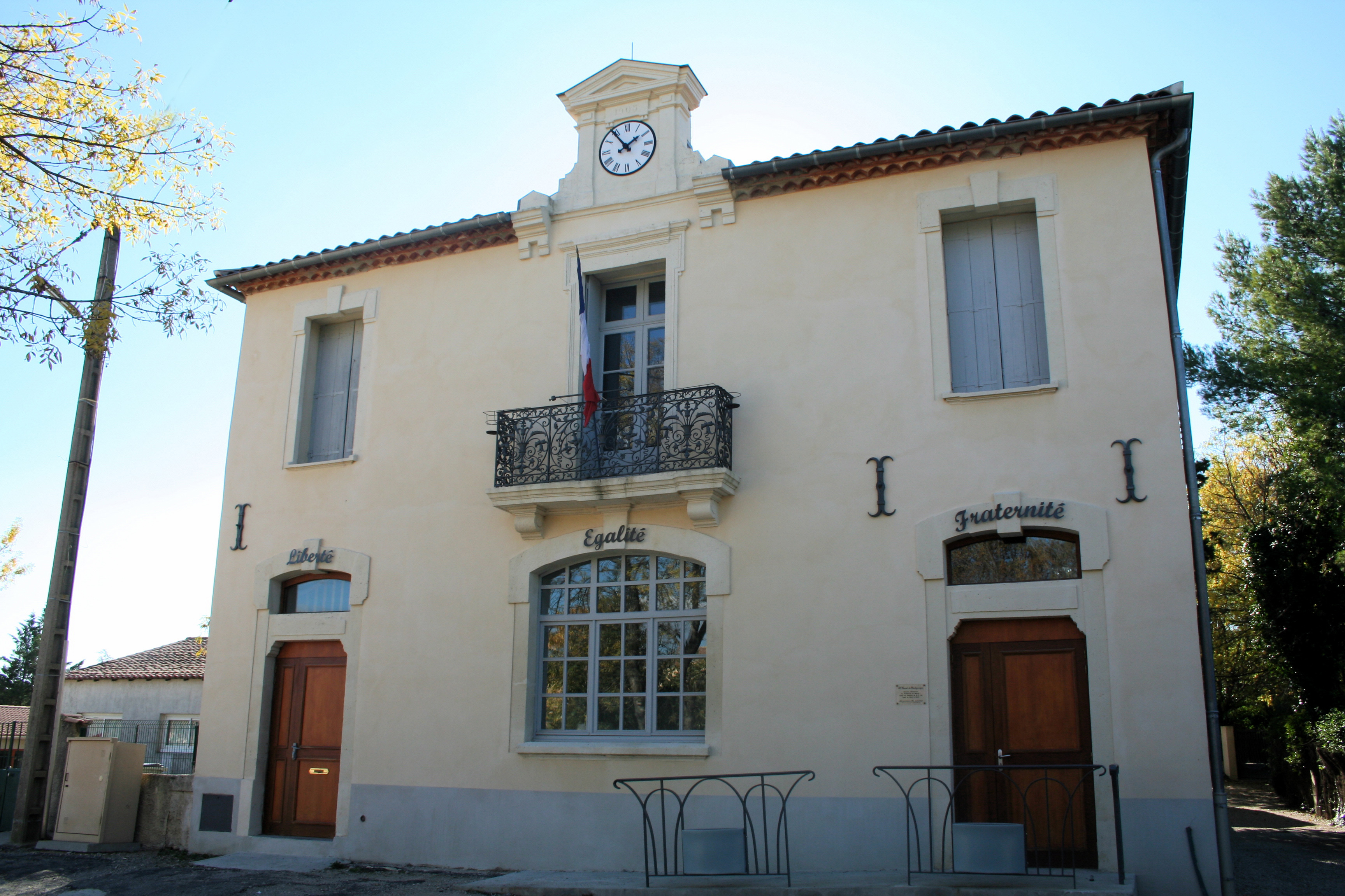 Saint-Vincent-de-Barbeyrargues (Hérault) - mairie.